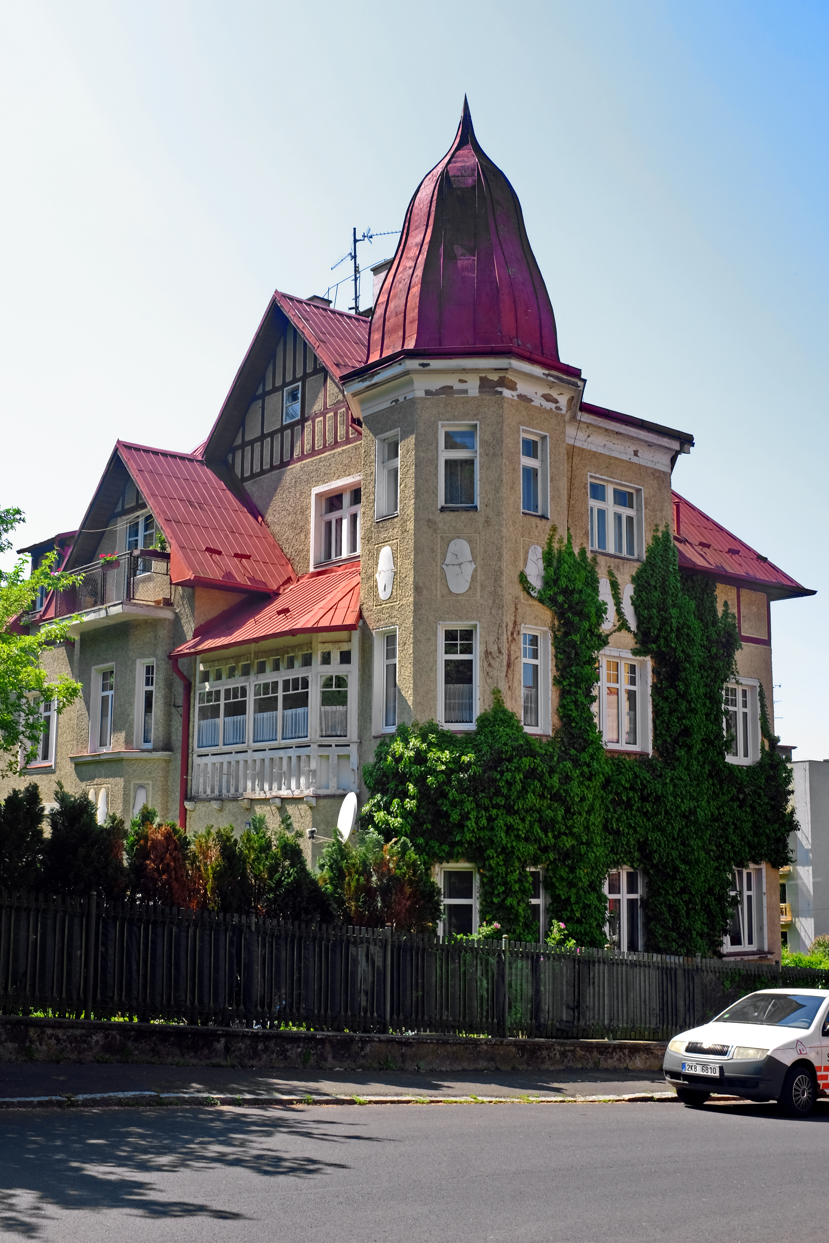 Karlovy Vary, místní čtvrť (ZSJ) Tuhnice, Brožíkova 6